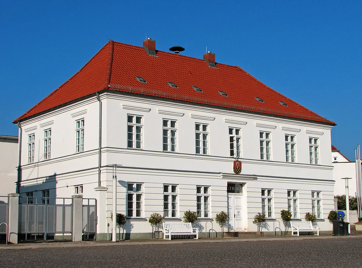 Beschreibung: Das Rathaus von Putbus an der Nordseite des Marktes. Fotograf: Darkone, 12. Oktober 2005